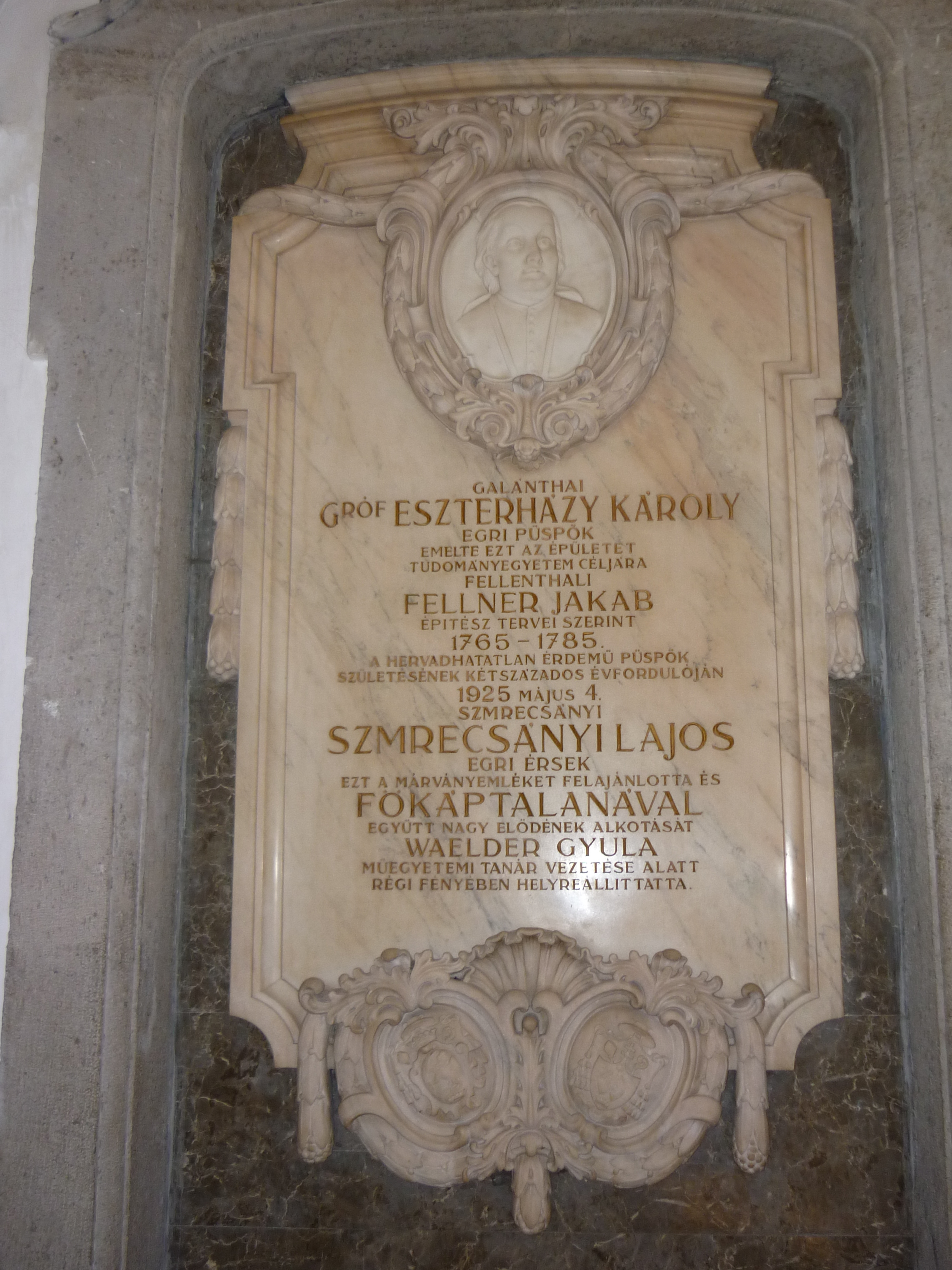 Eszterházy Károly püspök emléktáblája az egri líceumban